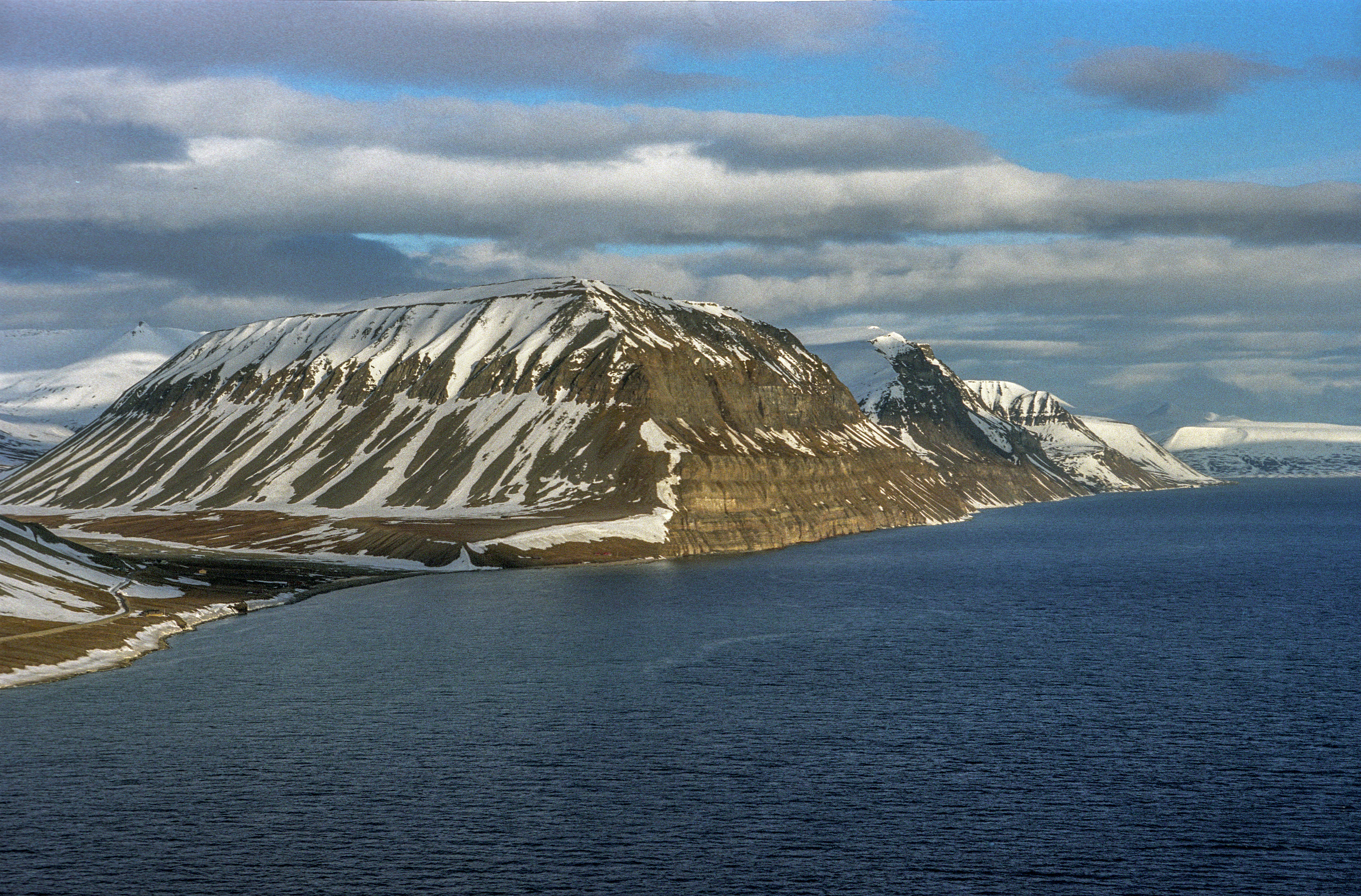 Nad Isfjorden